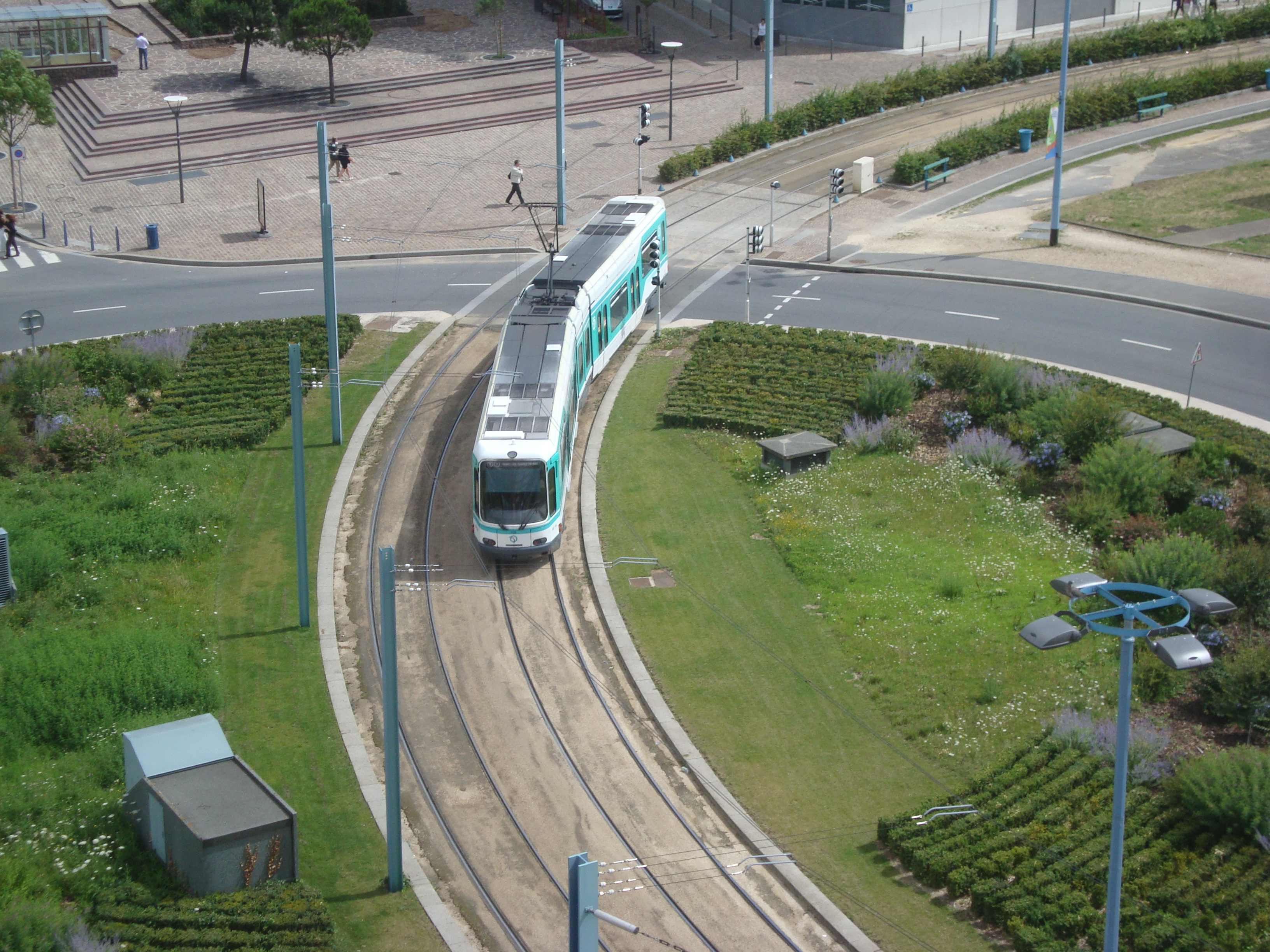 Un tramway TFS de la ligne T1 du réseau francilien sur le rond-point de la Préfecture de Bobigny. Le tram quitte l'arrêt Jean Rostand pour se diriger vers Pablo Picasso.